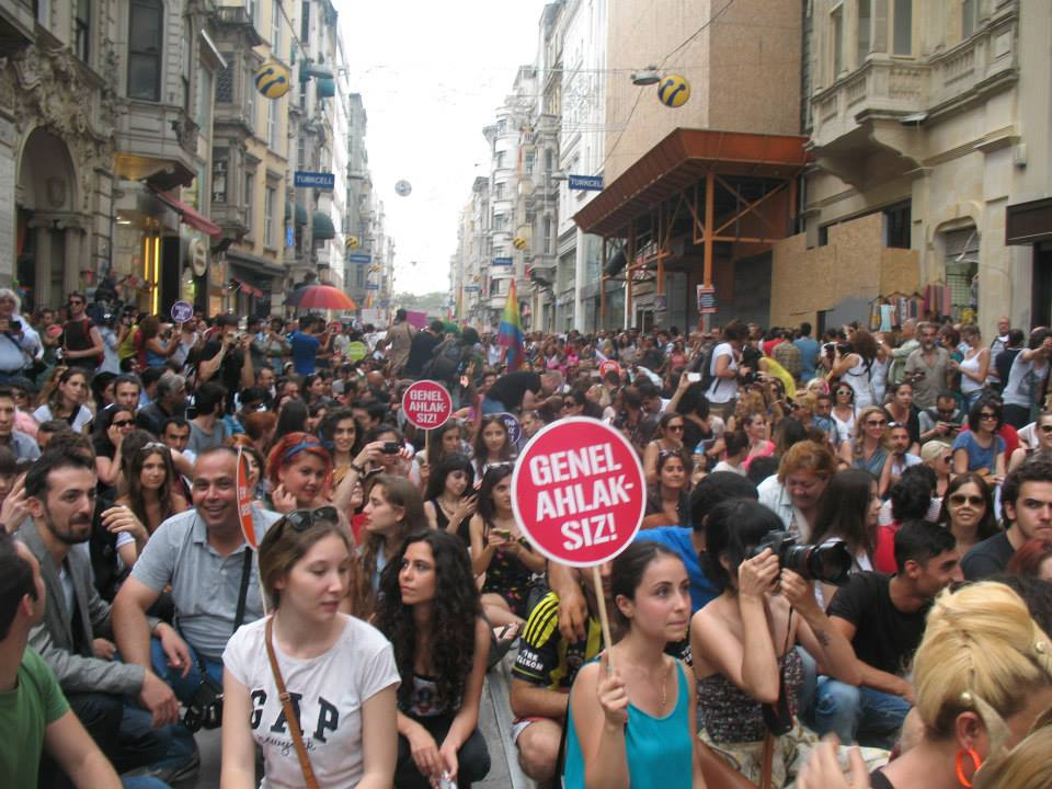 LGBT Onur Haftası etkinlikleri son gününde düzenlenen geleneksel İstanbul LGBT Onur Yürüyüşü, 2013, İstiklal Caddesi, İstanbul.